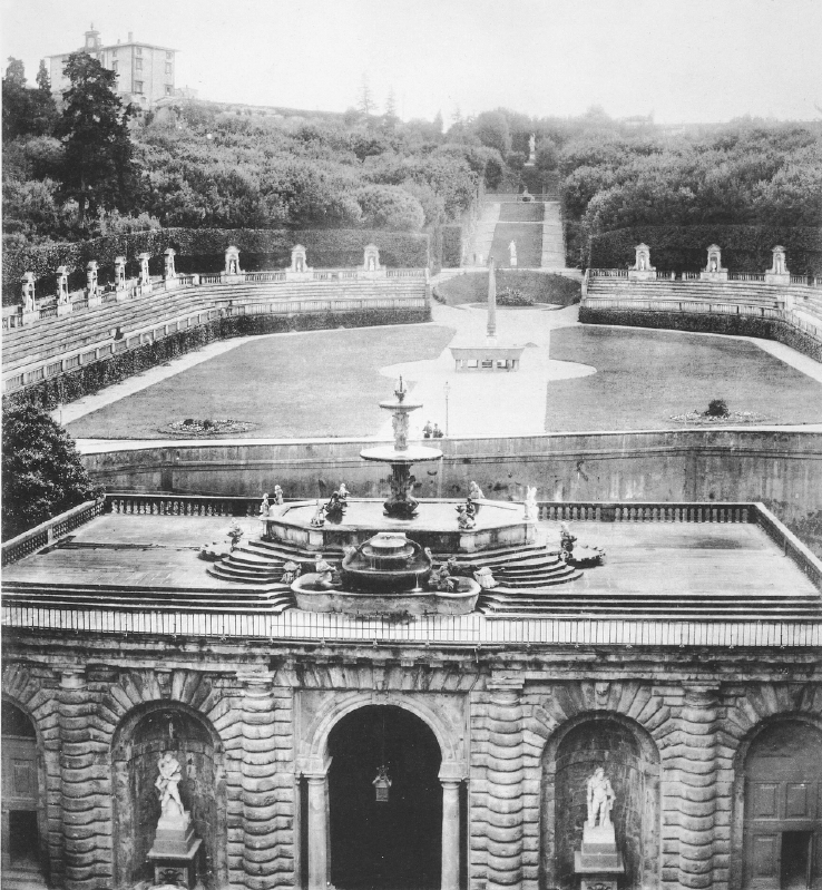 Obrázek z knihy The art of garden design in Italy od H. Inigo Triggse.